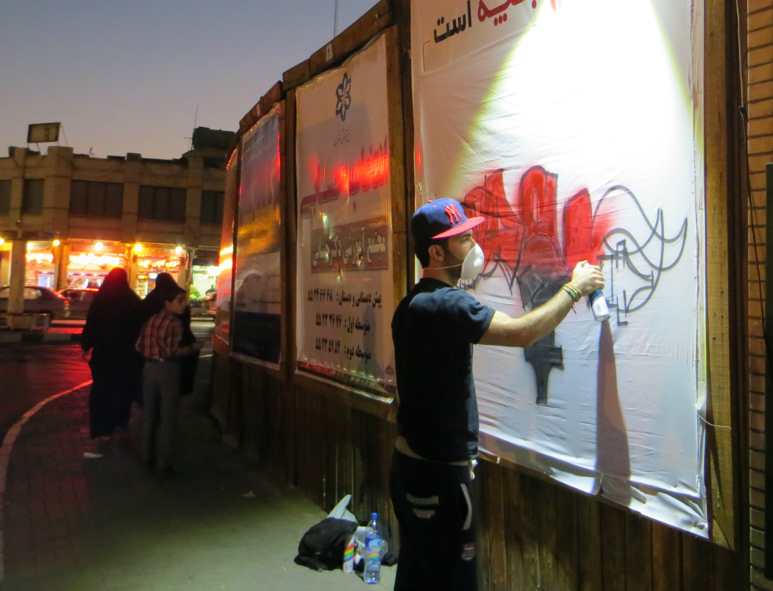 Reza Rioter